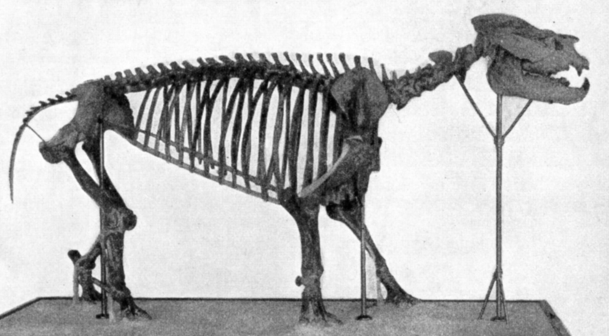 Metamynodon planifrons skeleton.